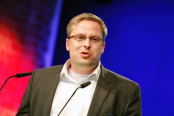 Philipp Otto, Politikberater